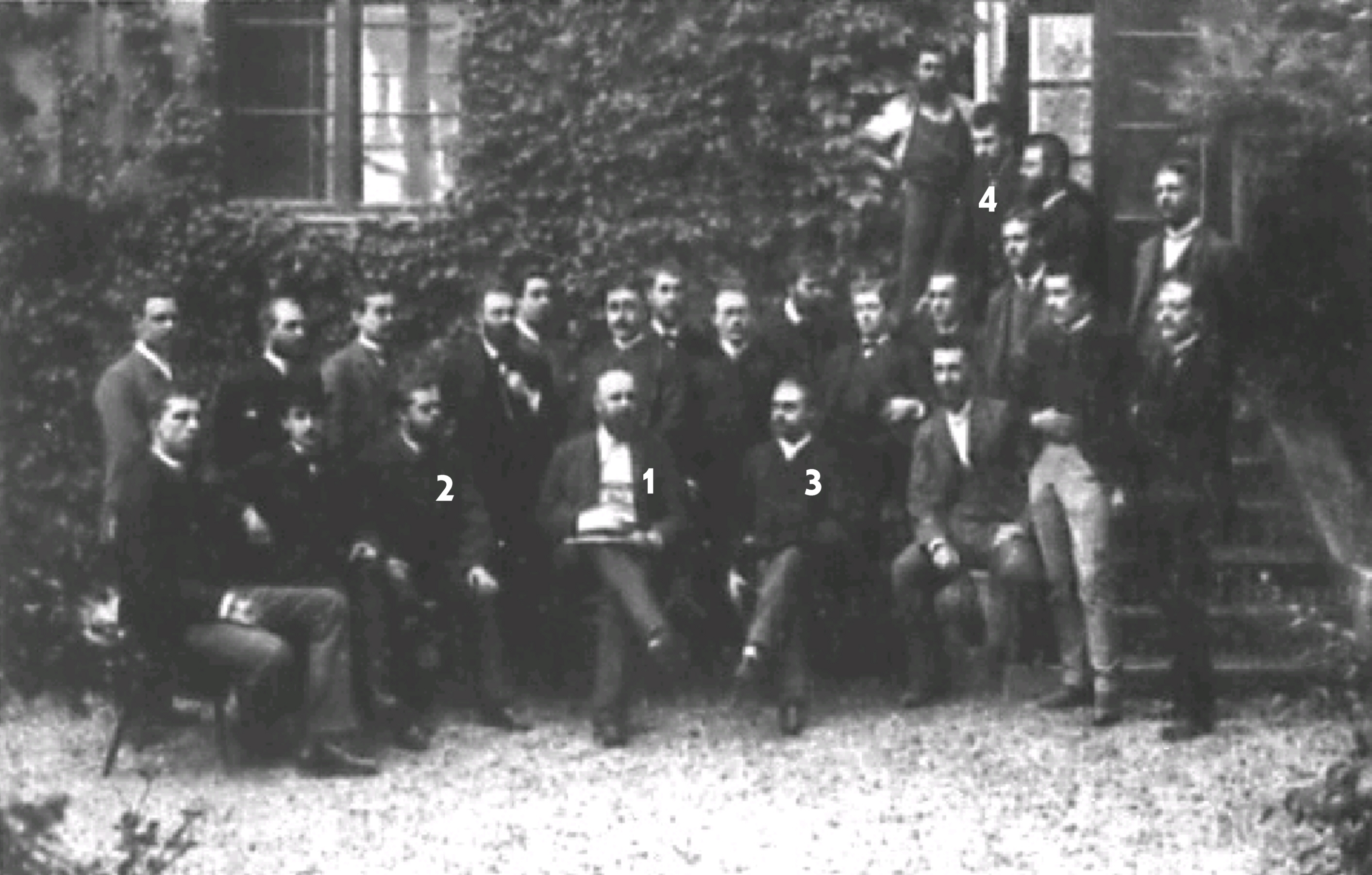 LMU München - Adolf Baeyer mit Studenten/Doktoranten ca 1885. Sitzend v.l.n.r.: ? ? 2: Prof. Wilhelm Koenigs (* 22. April 1851 in Dülken; † 15. Dezember 1906 in München) 1: Prof. Adolf Baeyer (* 31. Oktober 1835 in Berlin; † 20. August 1917 in Starnberg) 3: Dr. Hans von Pechmann (* 1. April 1850 in Nürnberg; † 19. April 1902 in Tübingen) 5: Dr. Eugen Bamberger, (* 19. Juli 1857 in Berlin; † 10. Dezember 1932 in Ponte Tresa, Schweiz) stehend rechts oben: 4: Eduard Buchner (* 20. Mai 1860 in München; † 13. August 1917 in Focșani, Rumänien)